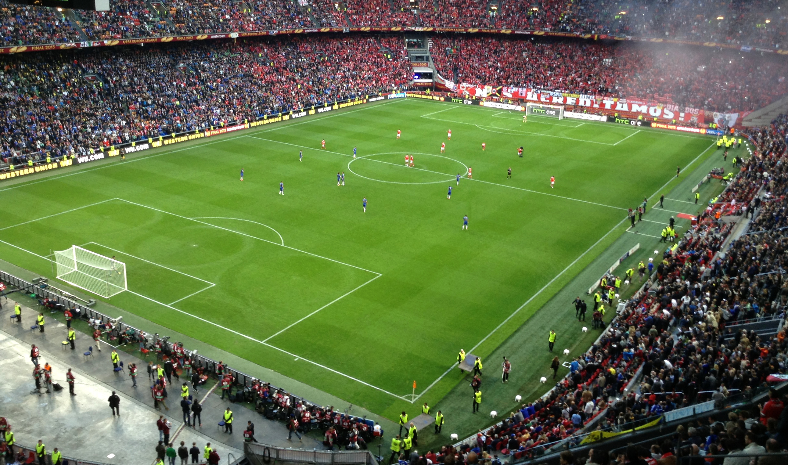 Anstoß zum Finale der UEFA Europa League 2012/13 in der Amsterdam Arena.